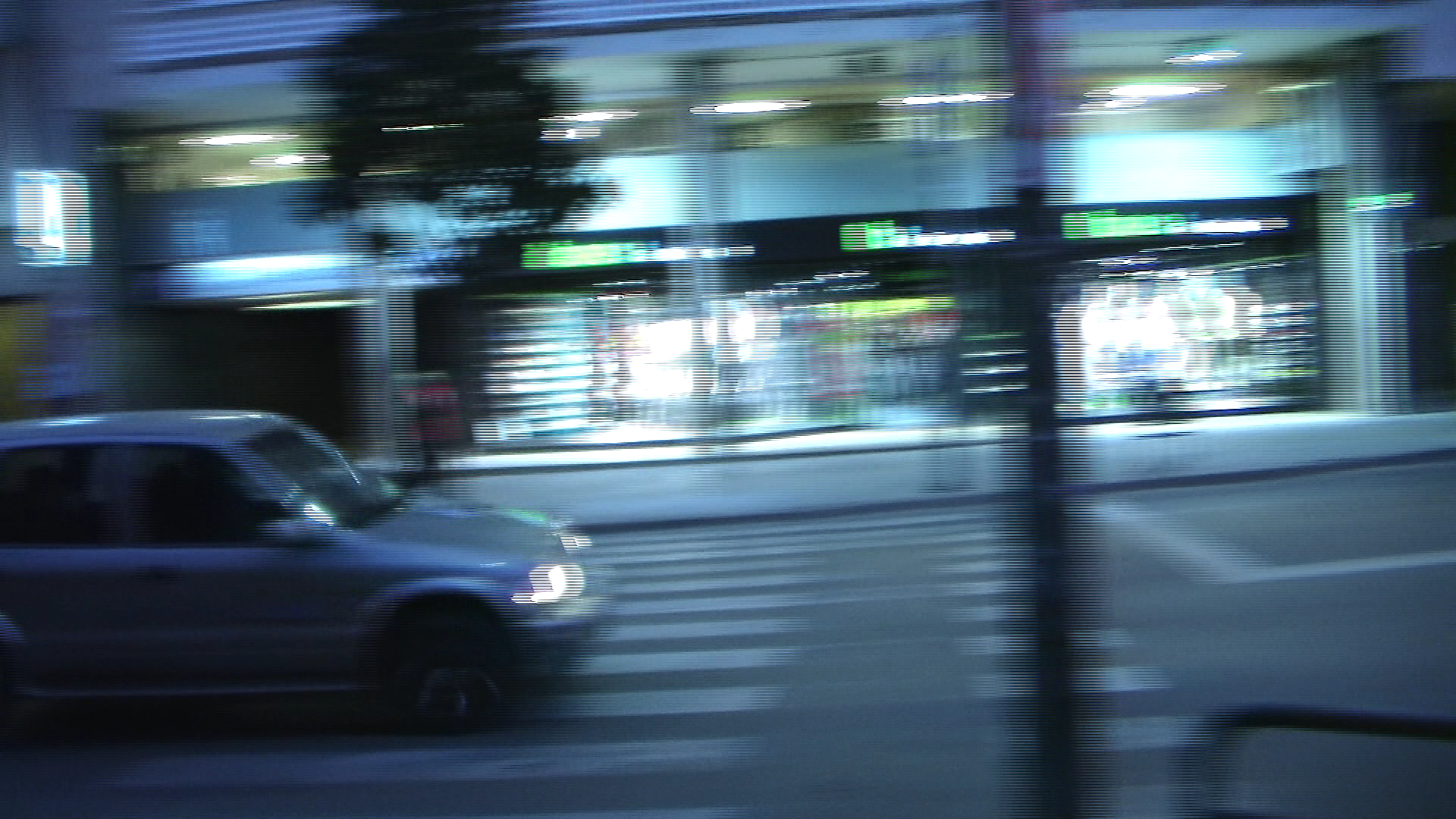 Fotograma d'un vídeo gravat amb resolució de 1080i de la zona universitària de l'EUETIT a Terrassa, avinguda Jacquard. Gravat amb la finalitat de veure-hi el mode entrellaçat a través d'un monitor de PC (és a dir progressiu), veure-hi l'"efecte pinta".